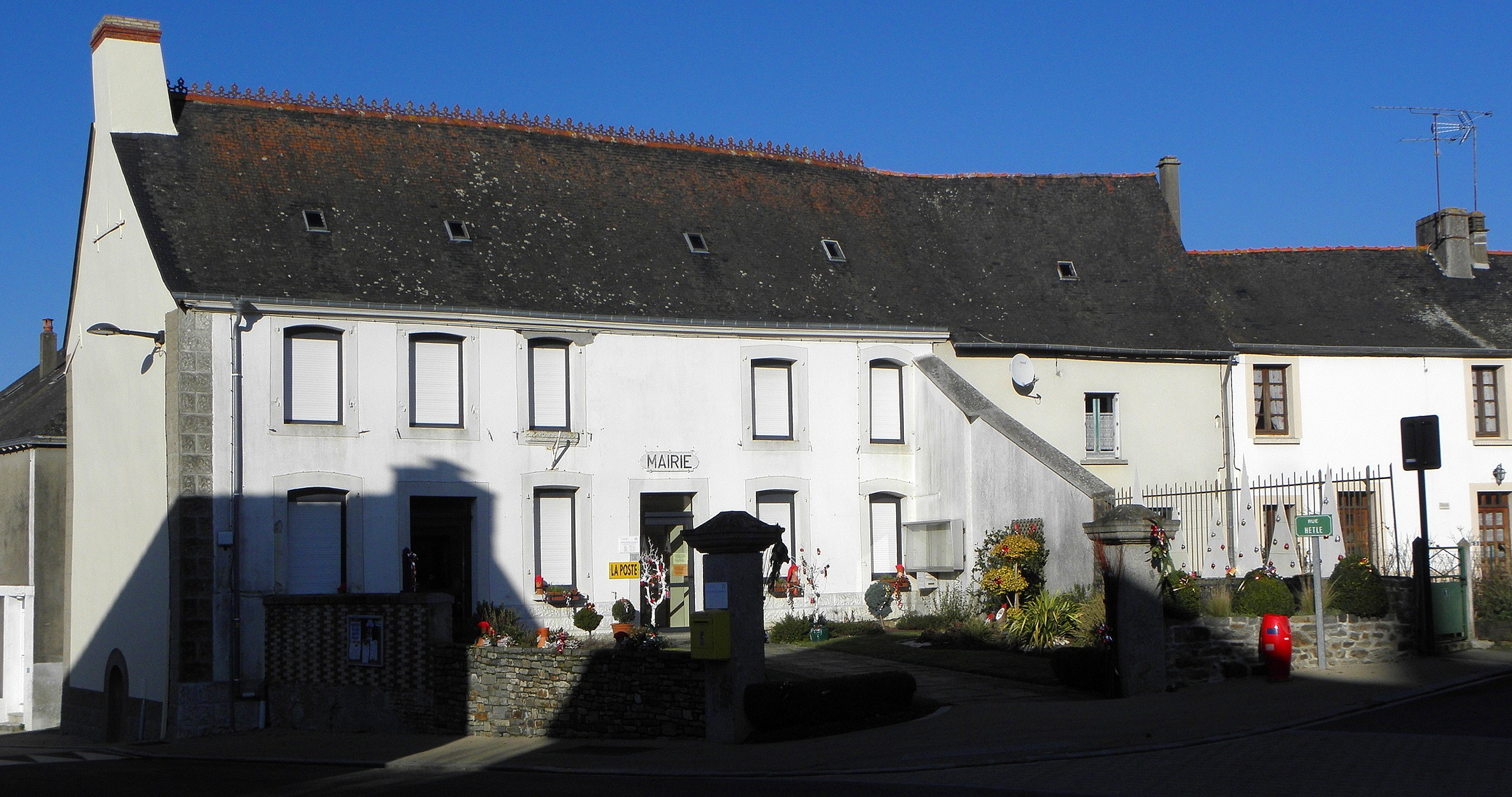 Mairie de Bourgon (53).